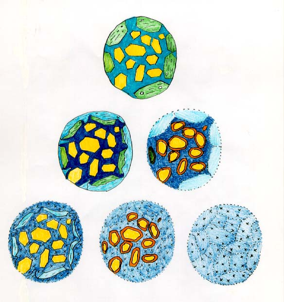 Porfiros kondrum rajza fokozatosan átalakulva a vizes hatásokra